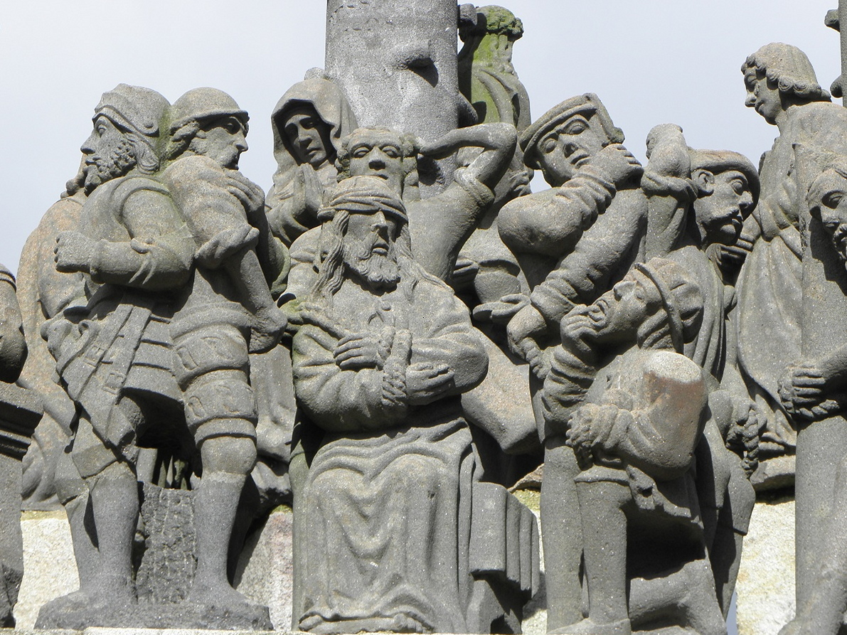 Le Christ aux outrages. Détail du calvaire de Plougonven (29). .